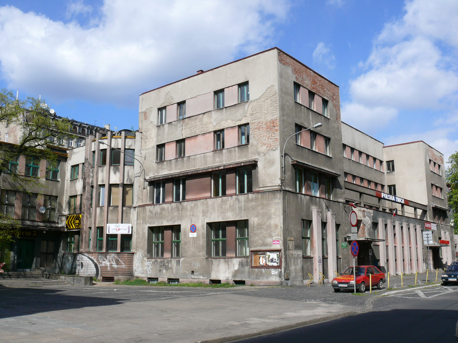 YMCA w Łodzi